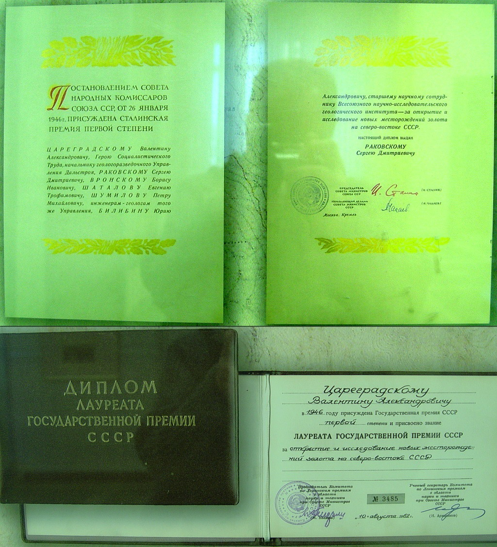 Трансформация Сталинской премии в Государственную СССР на примере лауреата В. А. Цареградского. Из экспозиции Магаданского областного краеведческого музея.